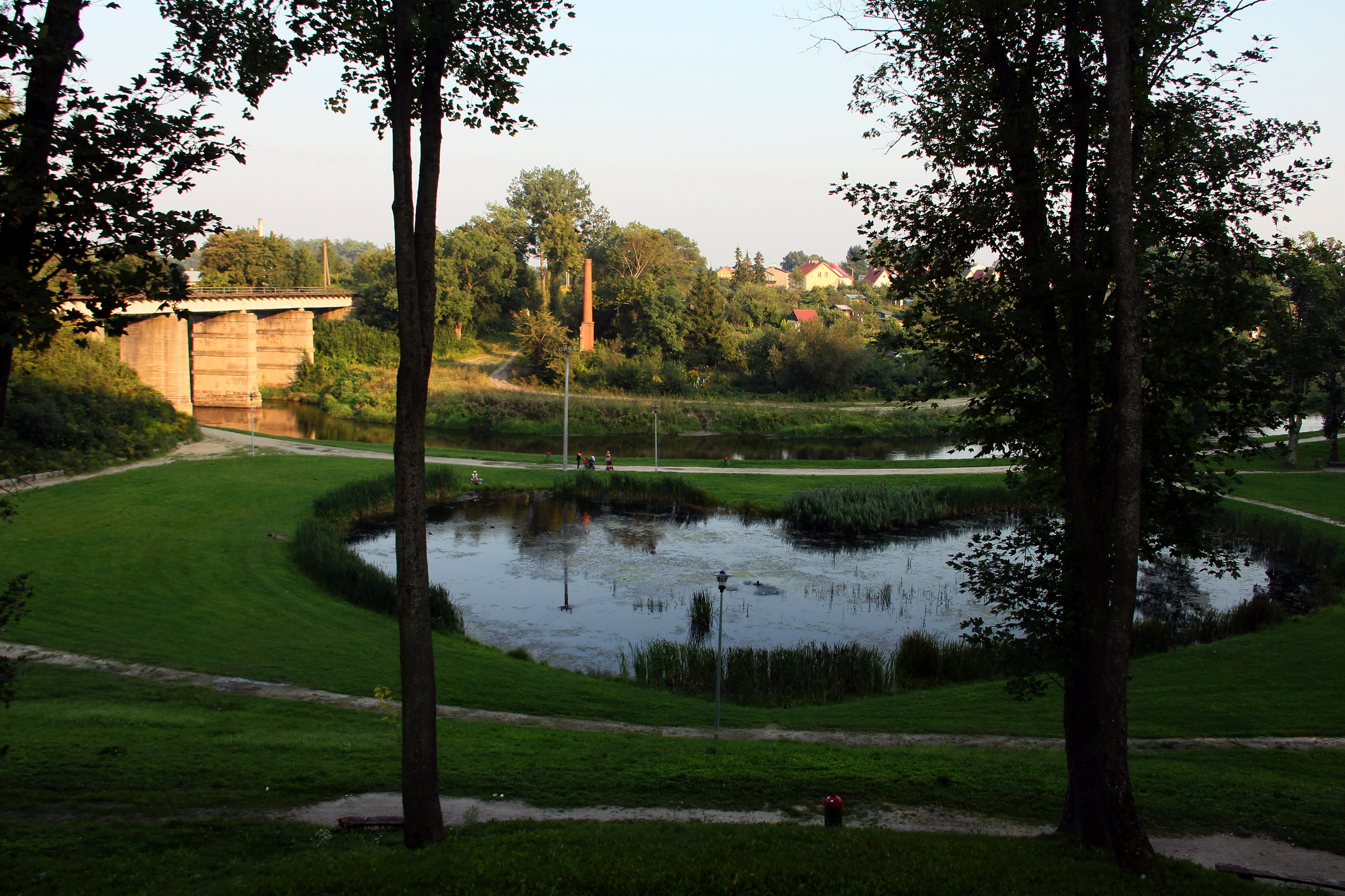 Bartoszyce. Park Elżbiety - Łyna, starorzecze zwane Sercem i most kolejowy.